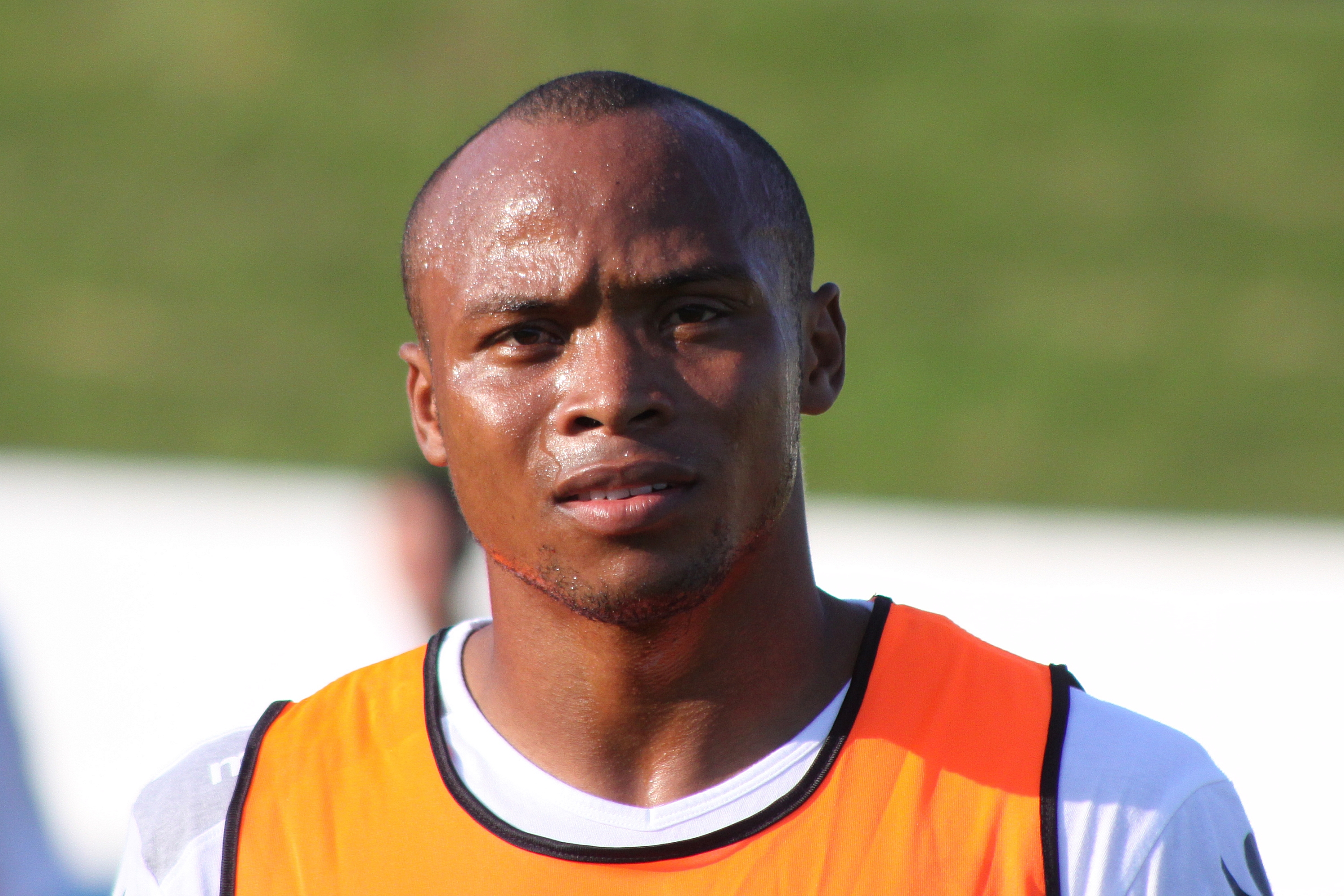 Juan Camilo Zúñiga - SSC Neapel (2) Juan Camilo Zúñiga - Società Sportiva Calcio Napoli